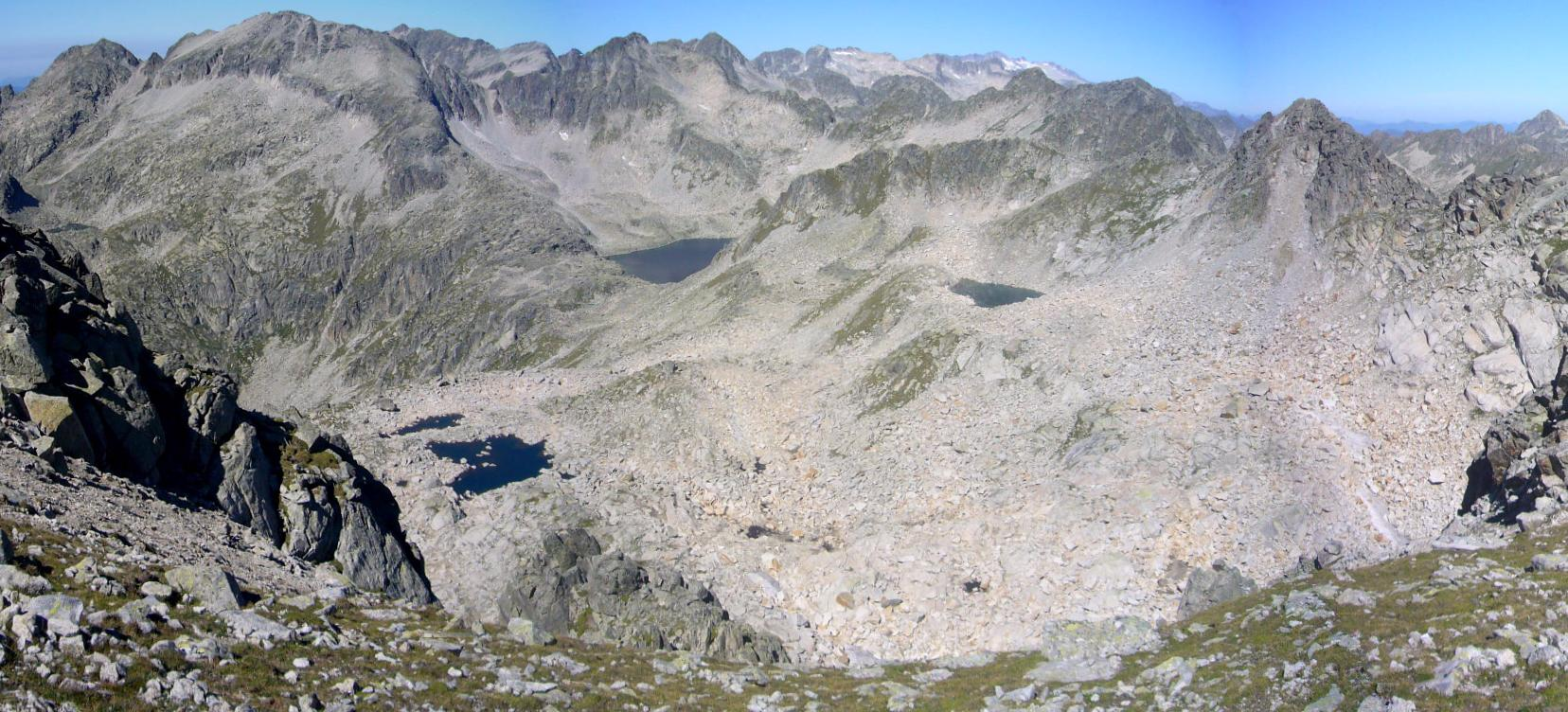 Circ de Contraix vist des de la collada al sud del Gran Tuc de Colomèrs; la Vall de Boí, Alta Ribagorça, Catalunya